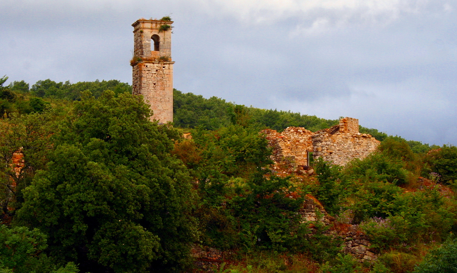 Pueblo abandonado de Ochate, en el Condado de Treviño, España.